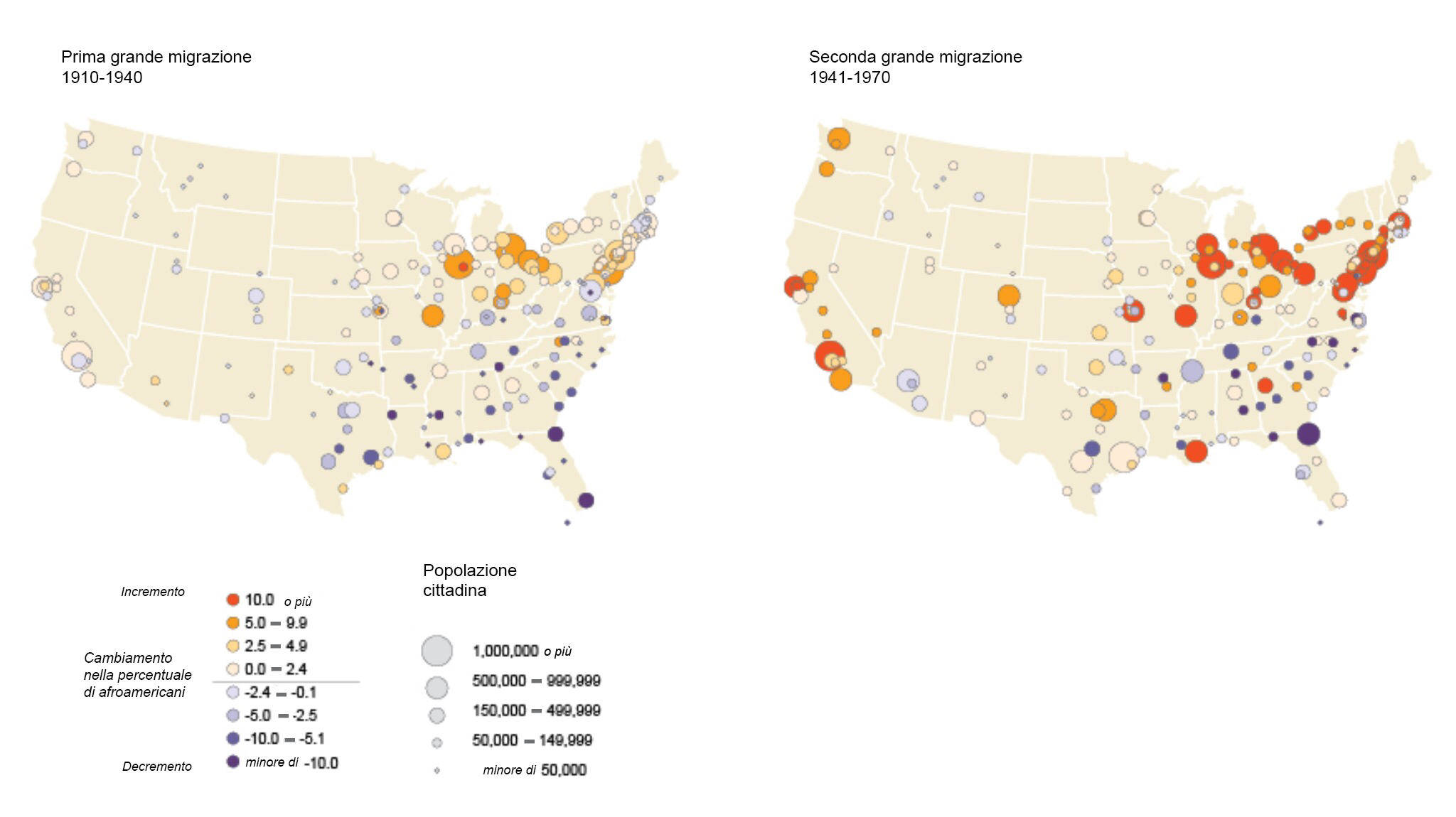 Percentuale nei flussi migratori degli afroamericani in USA durante la prima e la seconda Grande MIgrazione